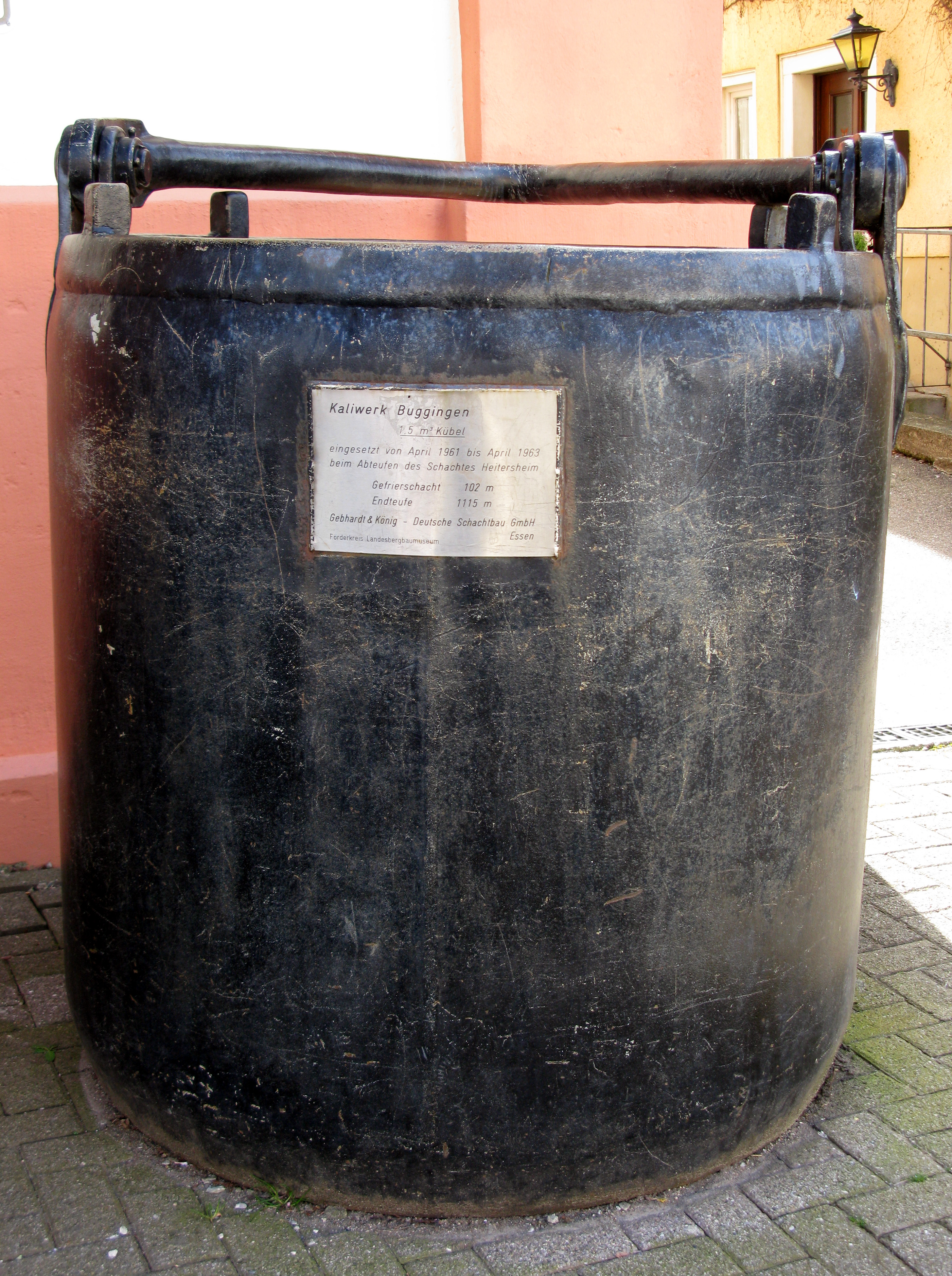 Kübel aus dem Kaliwerk Buggingen vor dem Landesbergbaumuseum in Sulzburg